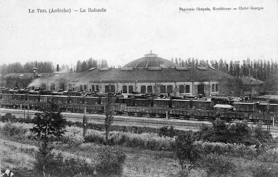 Carte postale du début des années 1900, montrant une des deux rotondes de la gare du Teil.